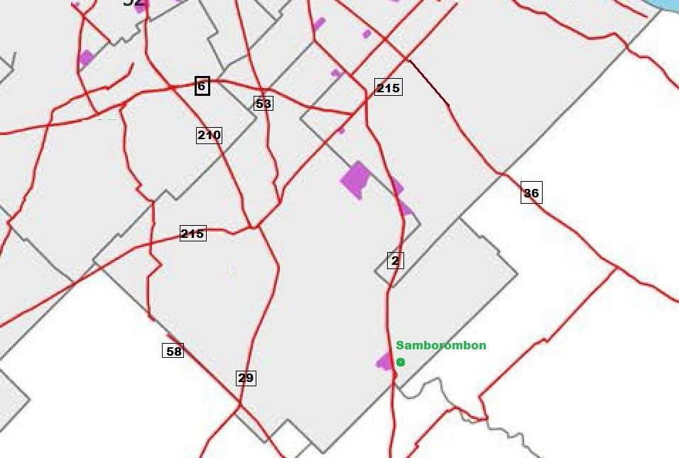 Ubicacion de La Posada Brandsen